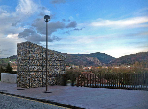 Plaza a la que da nombre el personaje, Lise, Eliseo Nicolás Alonso. [1]